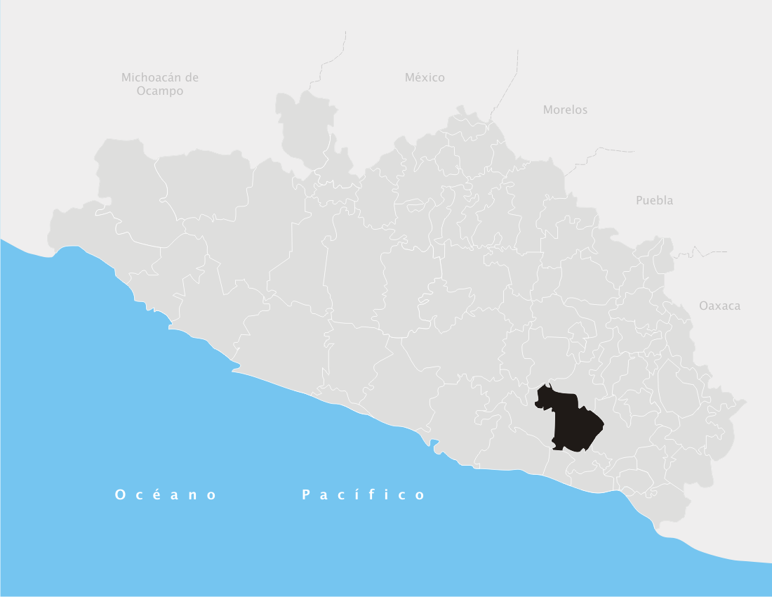 Ayutla en el estado de Guerrero (México)